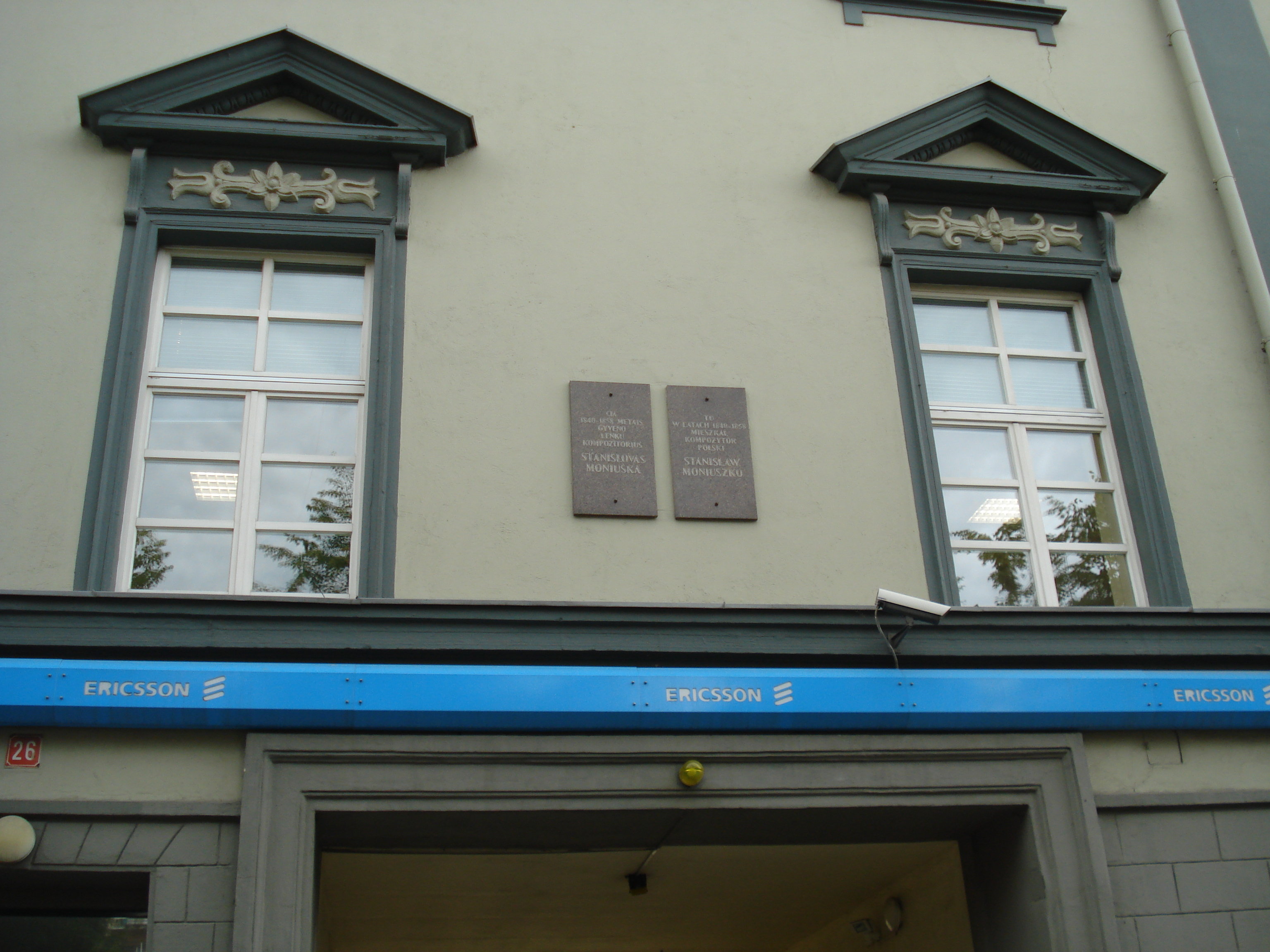 Miuler's house in Vilnius (Vokiečių g. 26). Here lived Stanislaw Moniuszko (1840-1858)